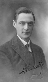 Nikolai Kaasik